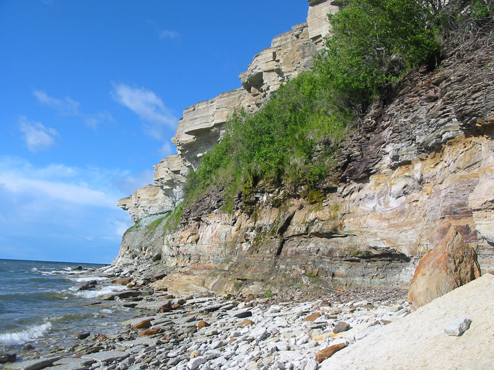 Pakri pank, milles paljanduvad Pakerordi, Varangu, Hunnebergi, Billingeni, Volhovi, Kunda, Aseri, Lasnamäe ja Uhaku lademed.